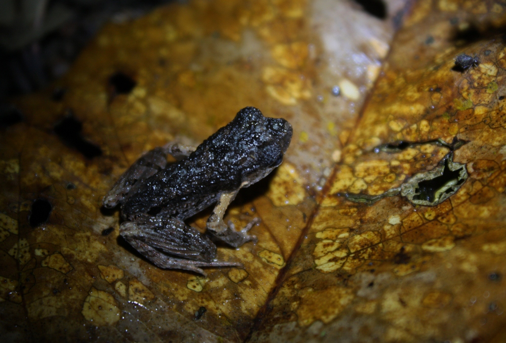 Spotted Litter Frog (Leptobrachium hendricksoni)